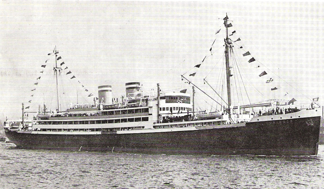 Die Orinoco, das Schwesterschiff der Magdalena